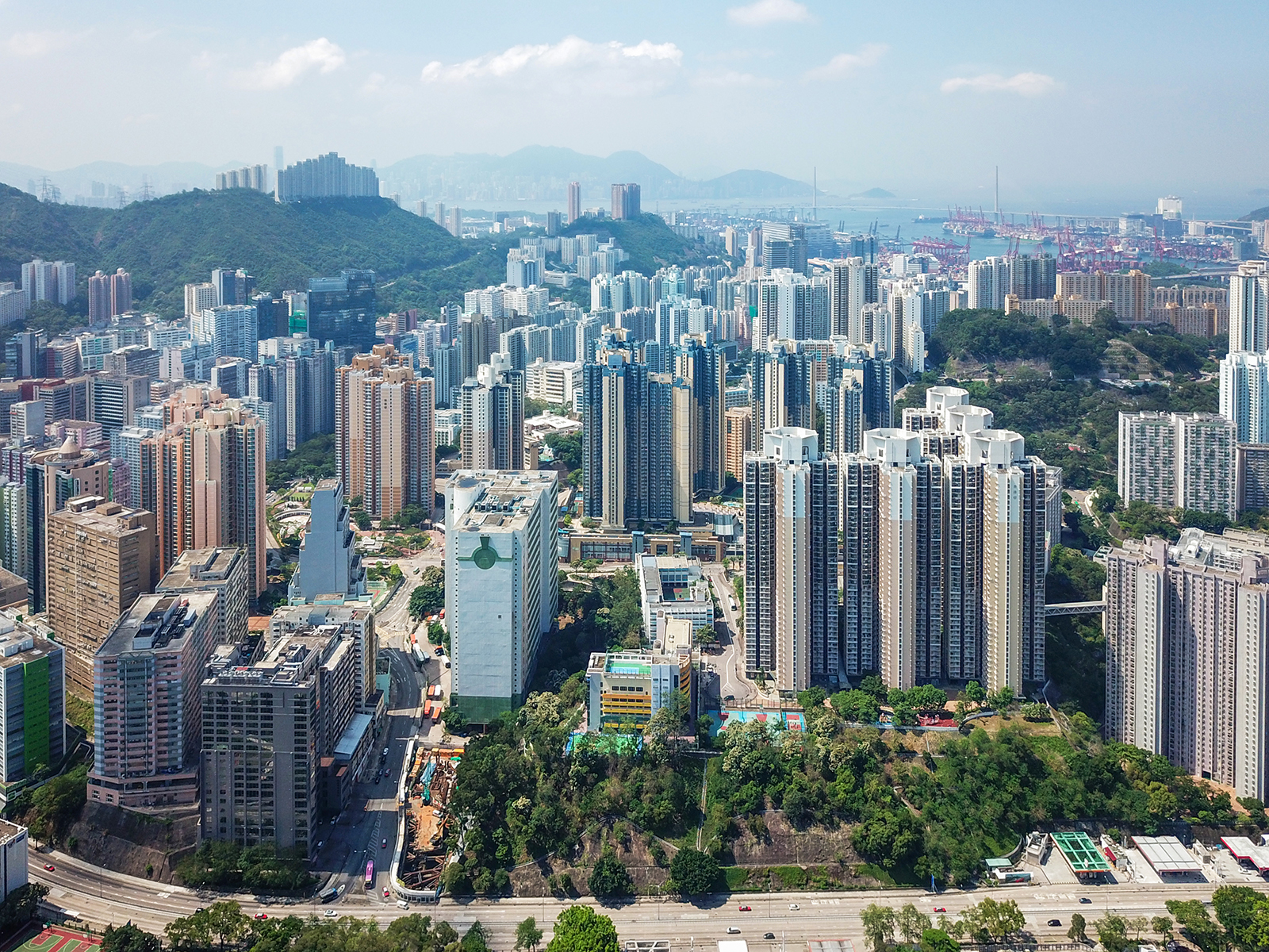 Kwai Chung Estate